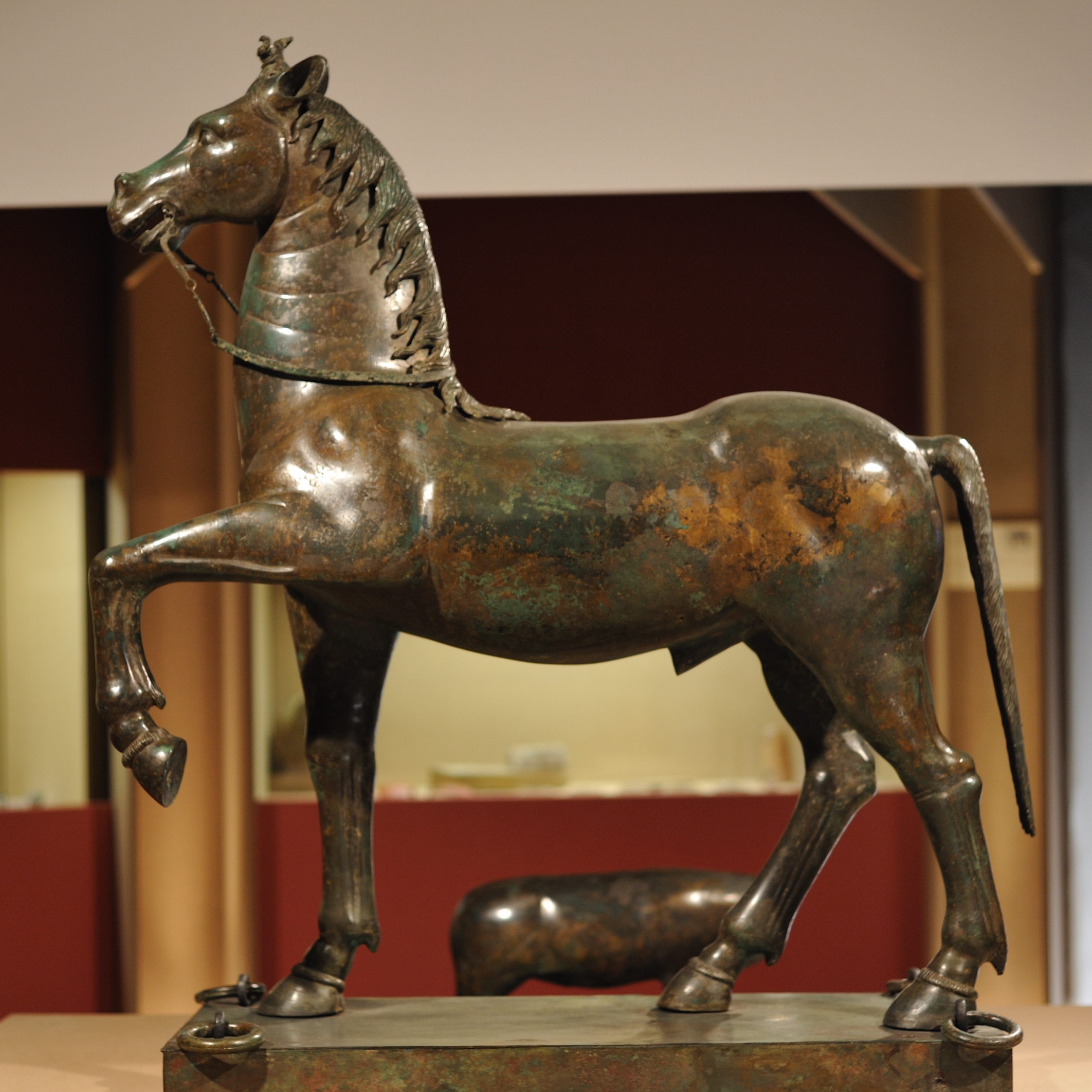 Cheval, statue en alliage cuivreux de la période gallo-romaine (Ier siècle av. J.-C. - Ier siècle ap. J.-C.), découverte à Neuvy-en-Sullias en 1861 et exposée au musée historique et archéologique de l'Orléanais, Orléans, Loiret, France